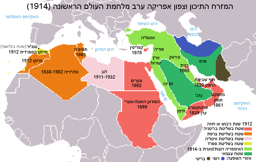 1914 empires colonies territory